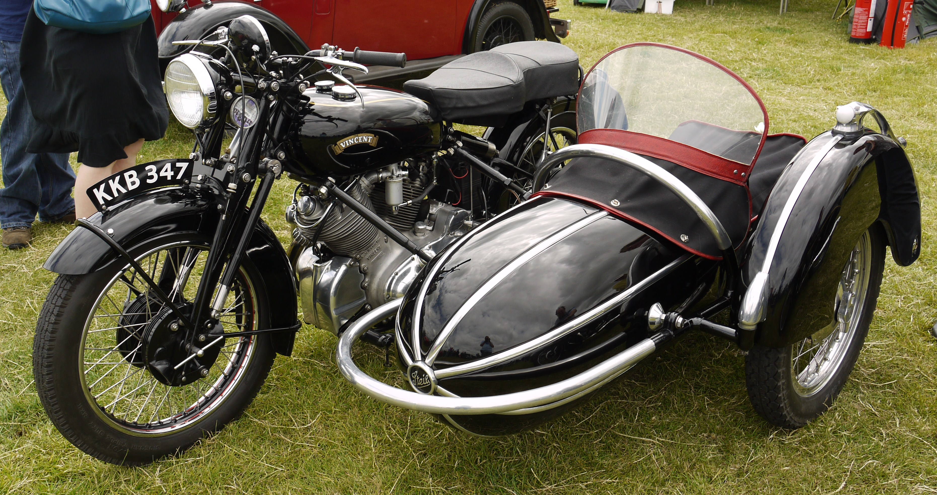 Panasonic G1 14-45 Lens